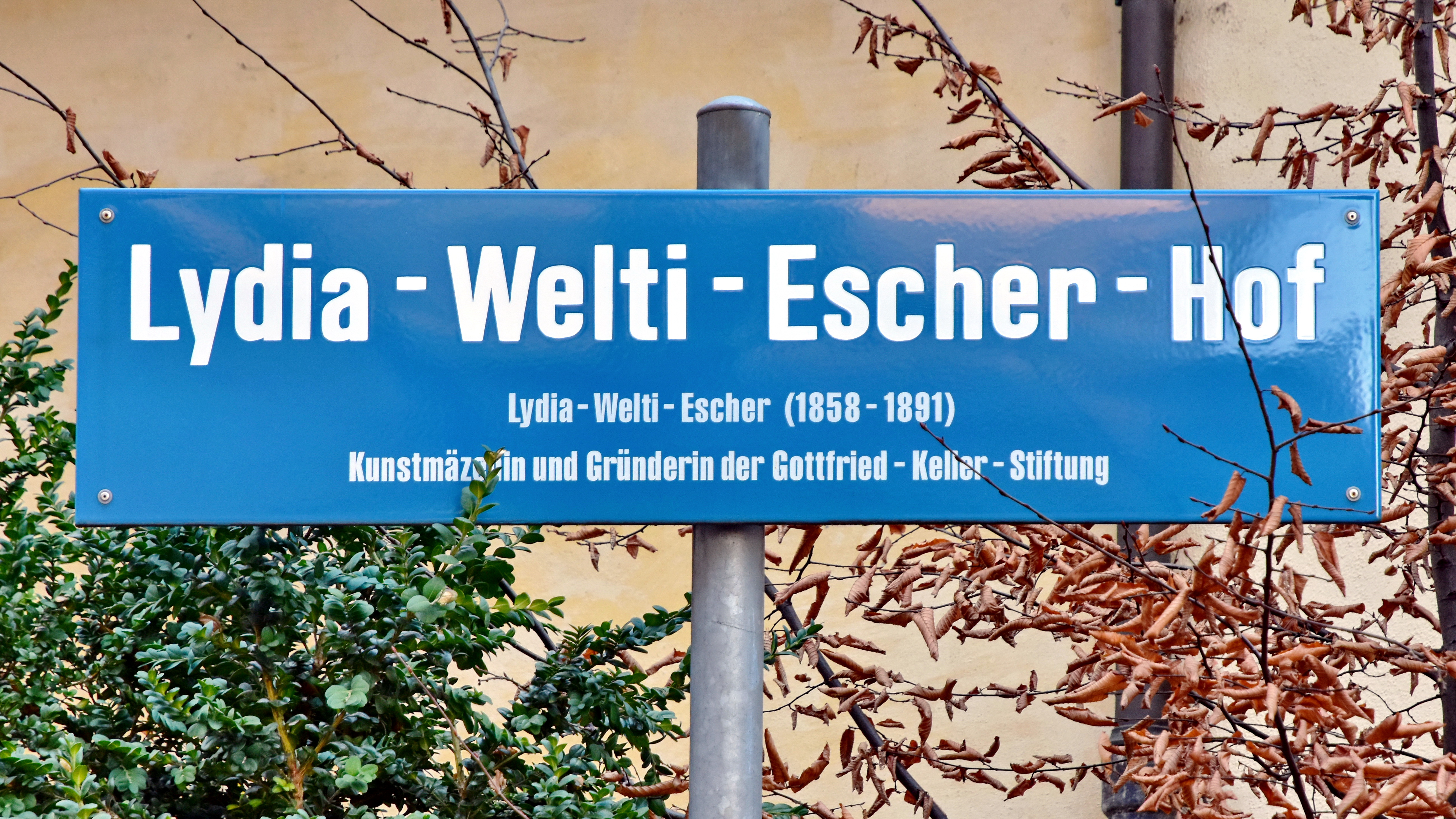 Lydia-Welti-Escher-Hof in Zürich-Oerlikon (Switzerland)